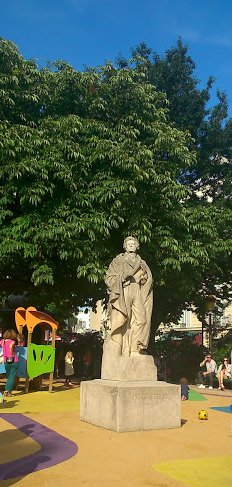 Statue d'Hector Berlioz dans le square Berlioz à Paris 9e